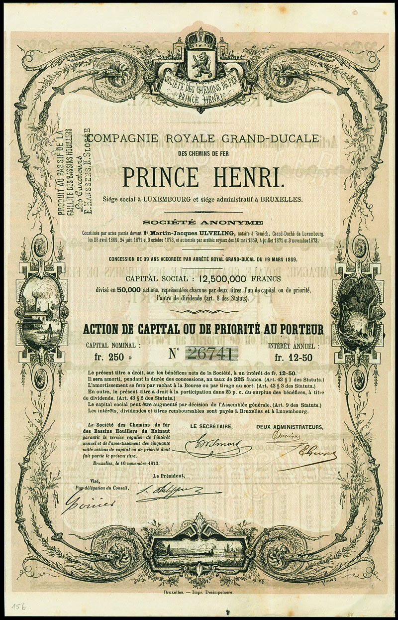 Aktië N° 26741 vun der Compagnie royale grand-ducale des chemins de fer Prince-Henri (Compagnie des chemins de fer Prince-Henri, 1869-1877).